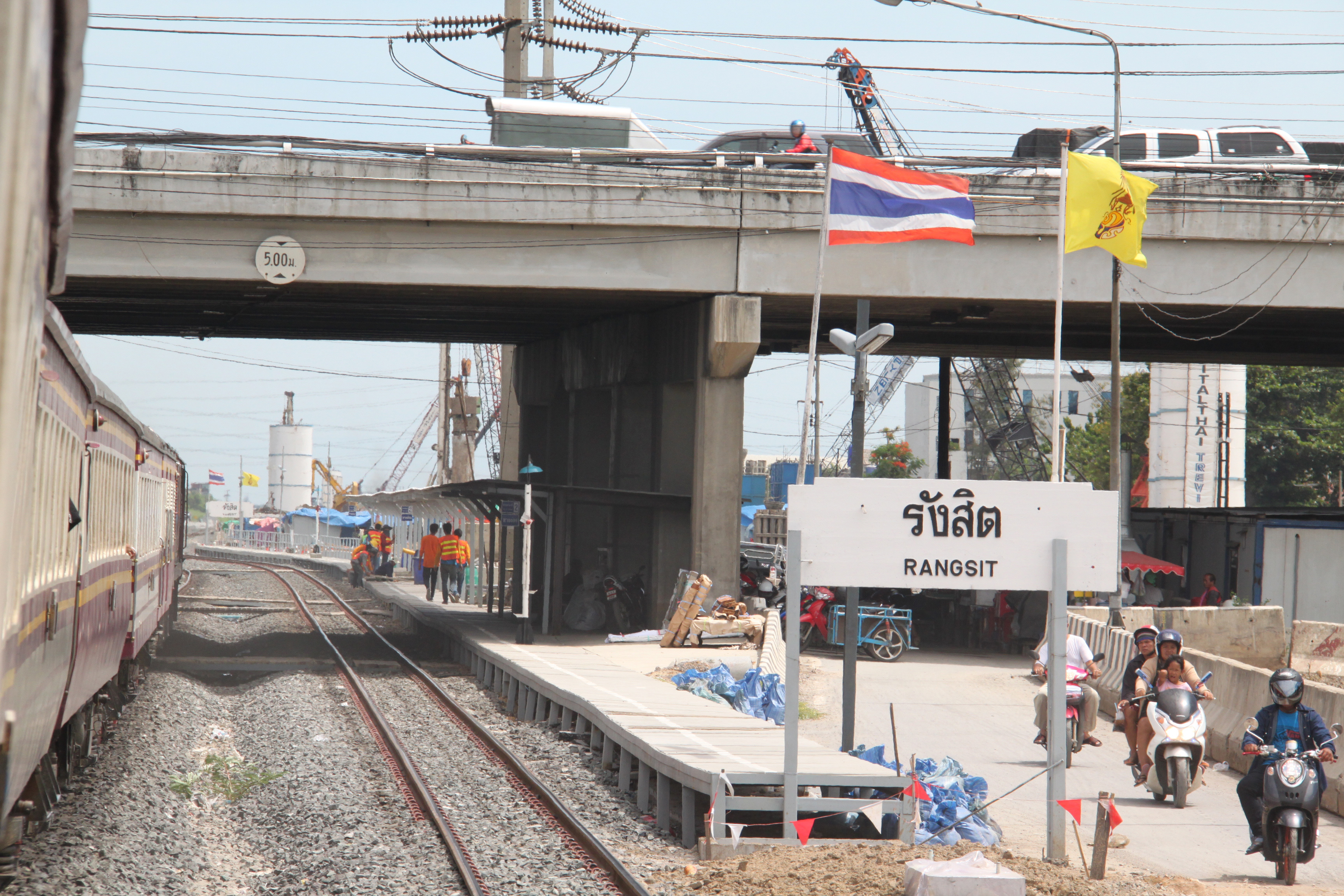 Rangsit railway station